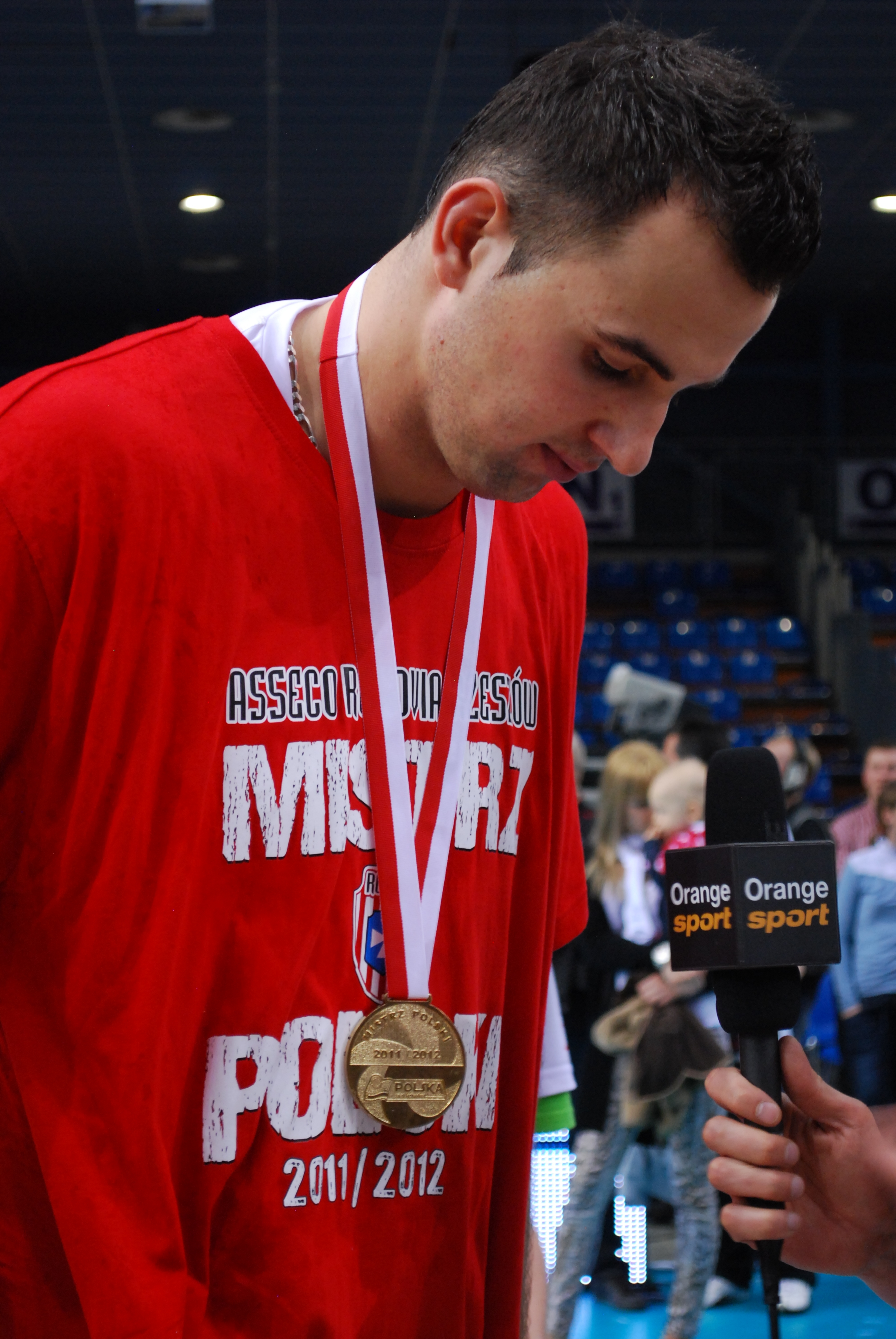 Georg Grozer ze złotym medalem.